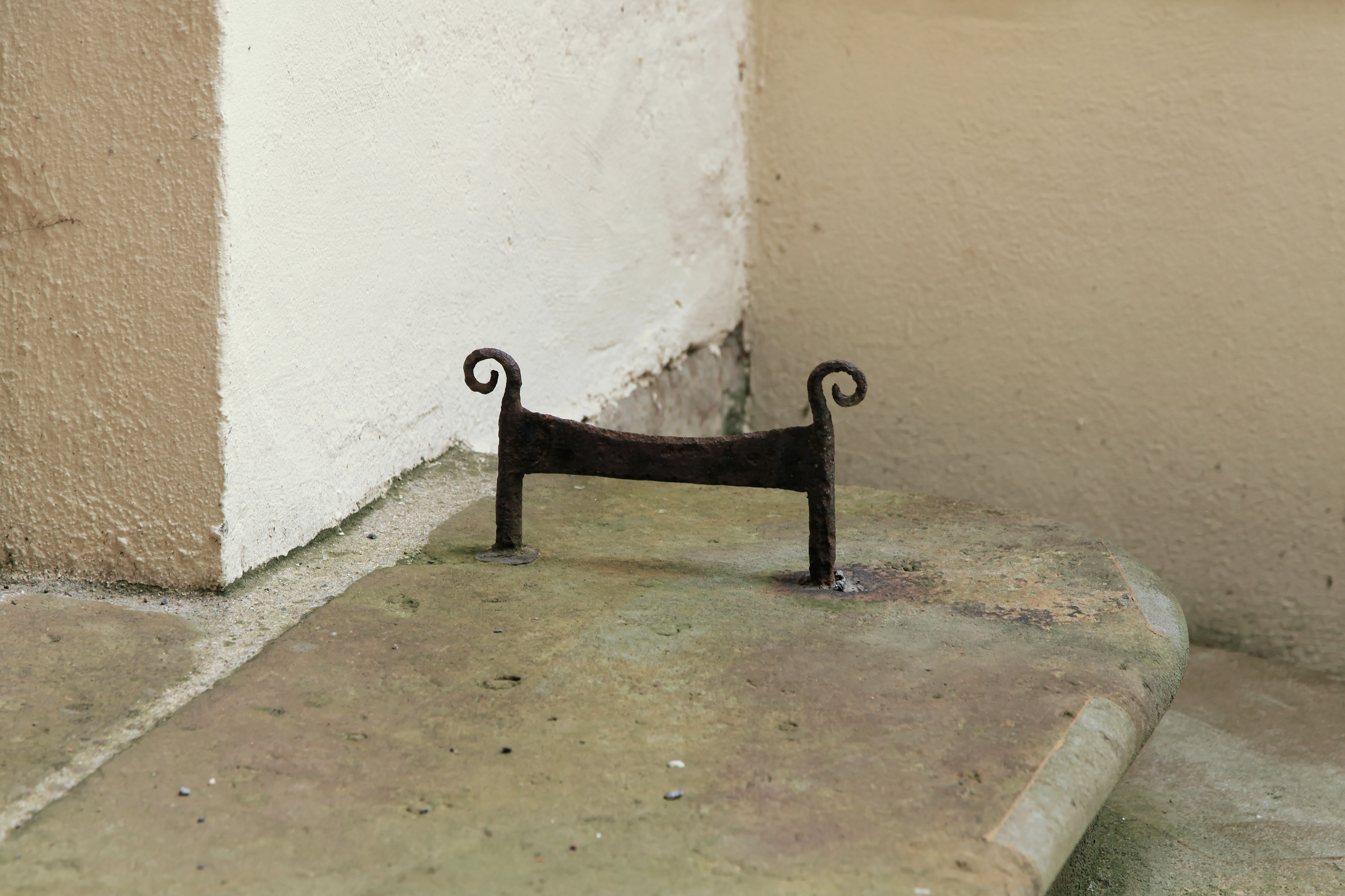 Peterskirche, Hauptstraße in Püchau, Machern